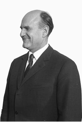 Title: Bundeskanzler Josef Klaus Extra information: Staatsbesuch des österreichischen Bundeskanzlers Dr. Josef Klaus, Gespräch mit Bundeskanzler Prof. Dr. Ludwig Erhard People in the image: Klaus, Josef: Bundeskanzler, Österreich Factual corrections and alternative descriptions are encouraged separately from the original description. Additionally errors can be reported at this page to inform the Bundesarchiv. Original historic description: Bundeskanzler Klaus (Österreich) bei Bundeskanzler Erhard